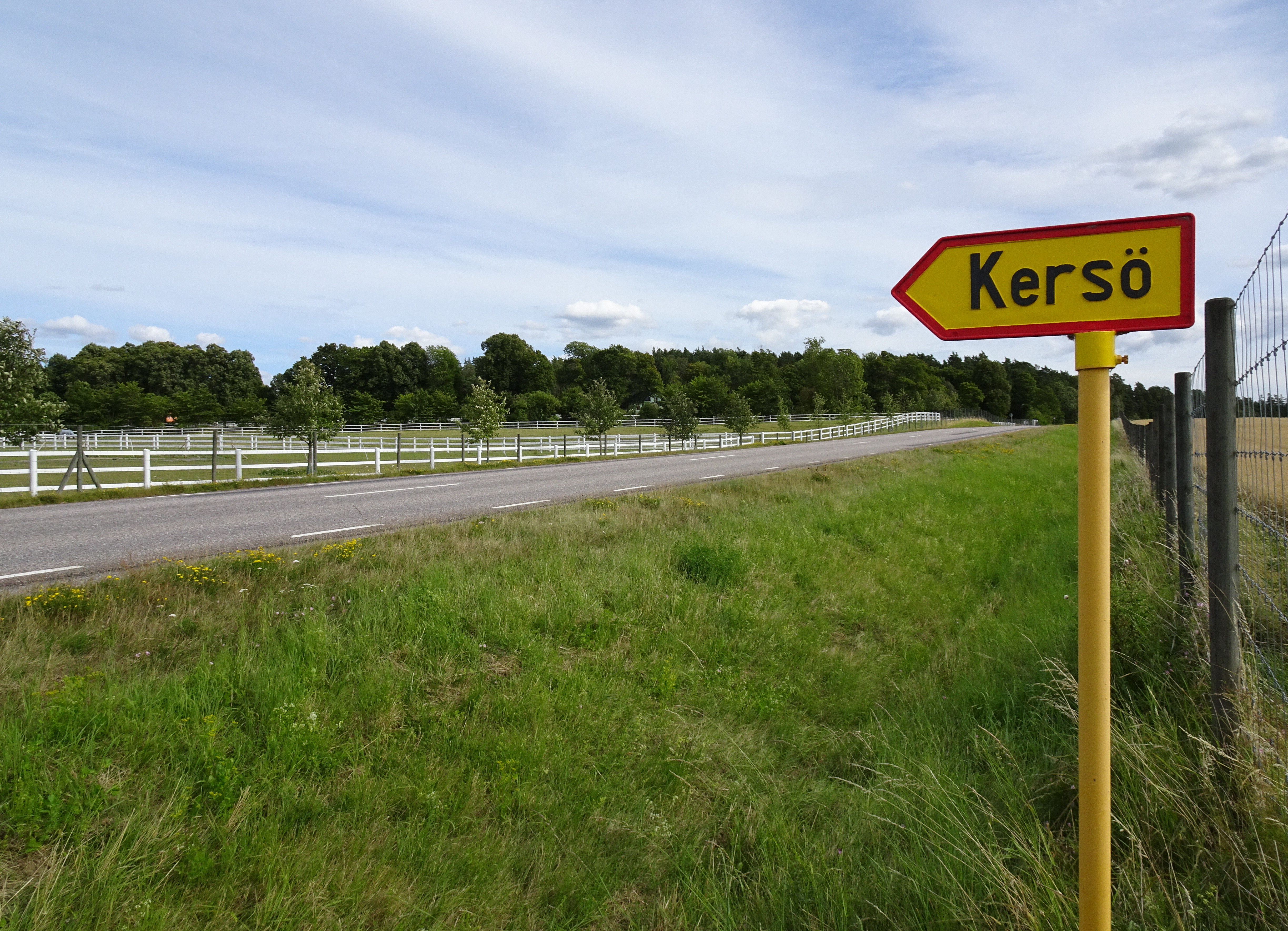 Kersö